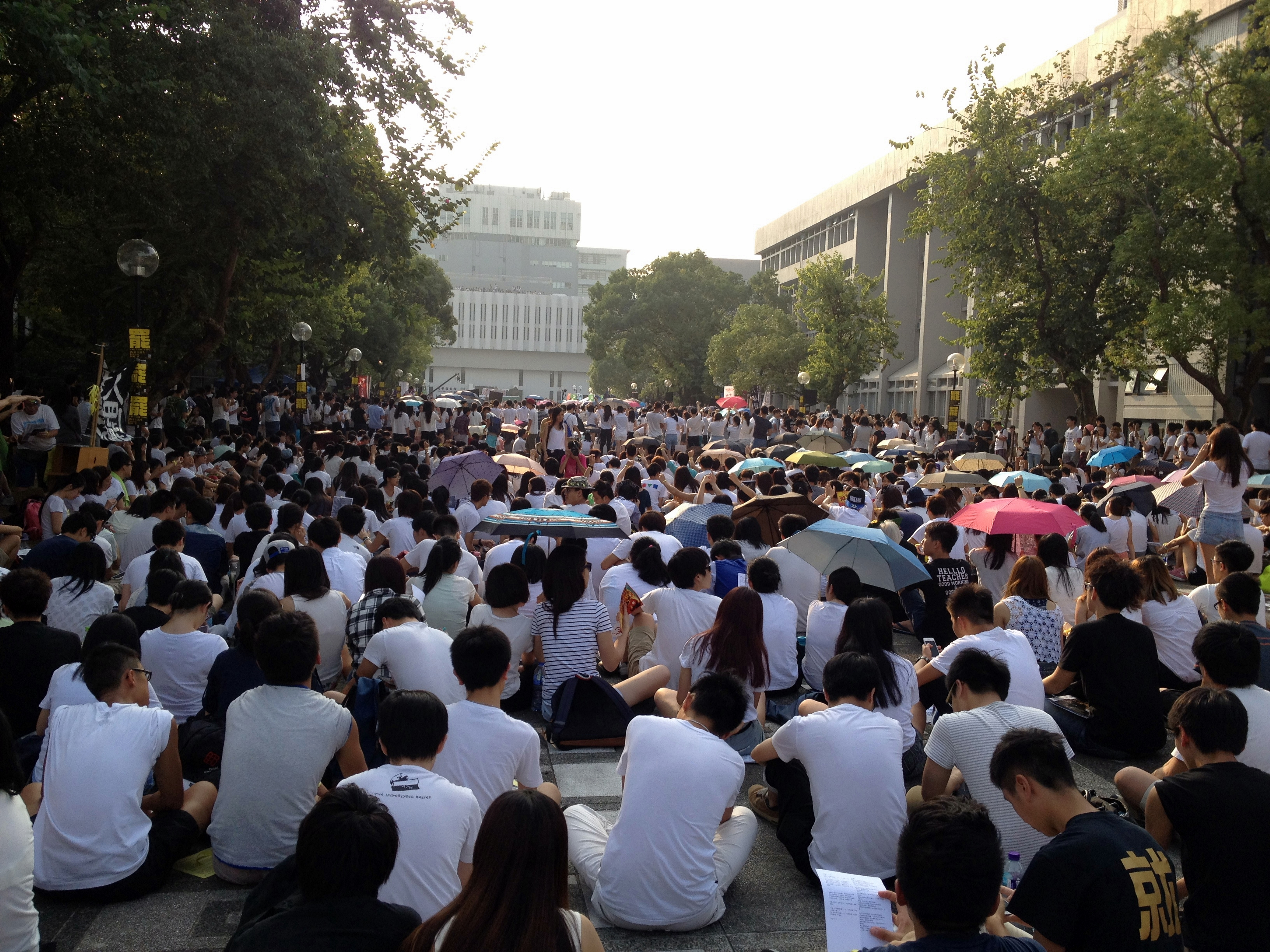 CUHK, Hong Kong Student Boycott in Hong Kong